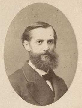 Eestimaa maanõunik ja rüütelkonna peamees Eduard von Maydell (1830-1899)